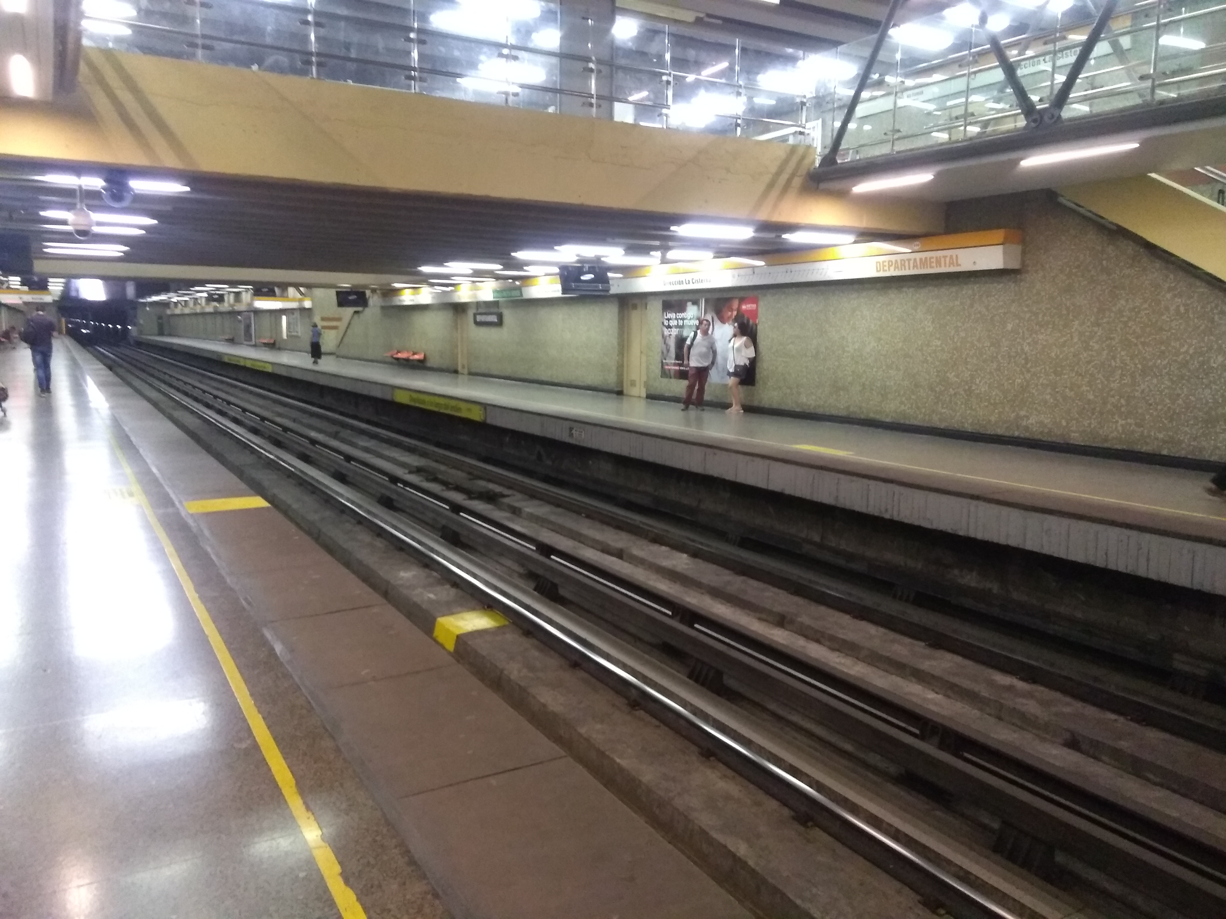 Estación Departamental de la L2, ubicada en la comuna de San Miguel.